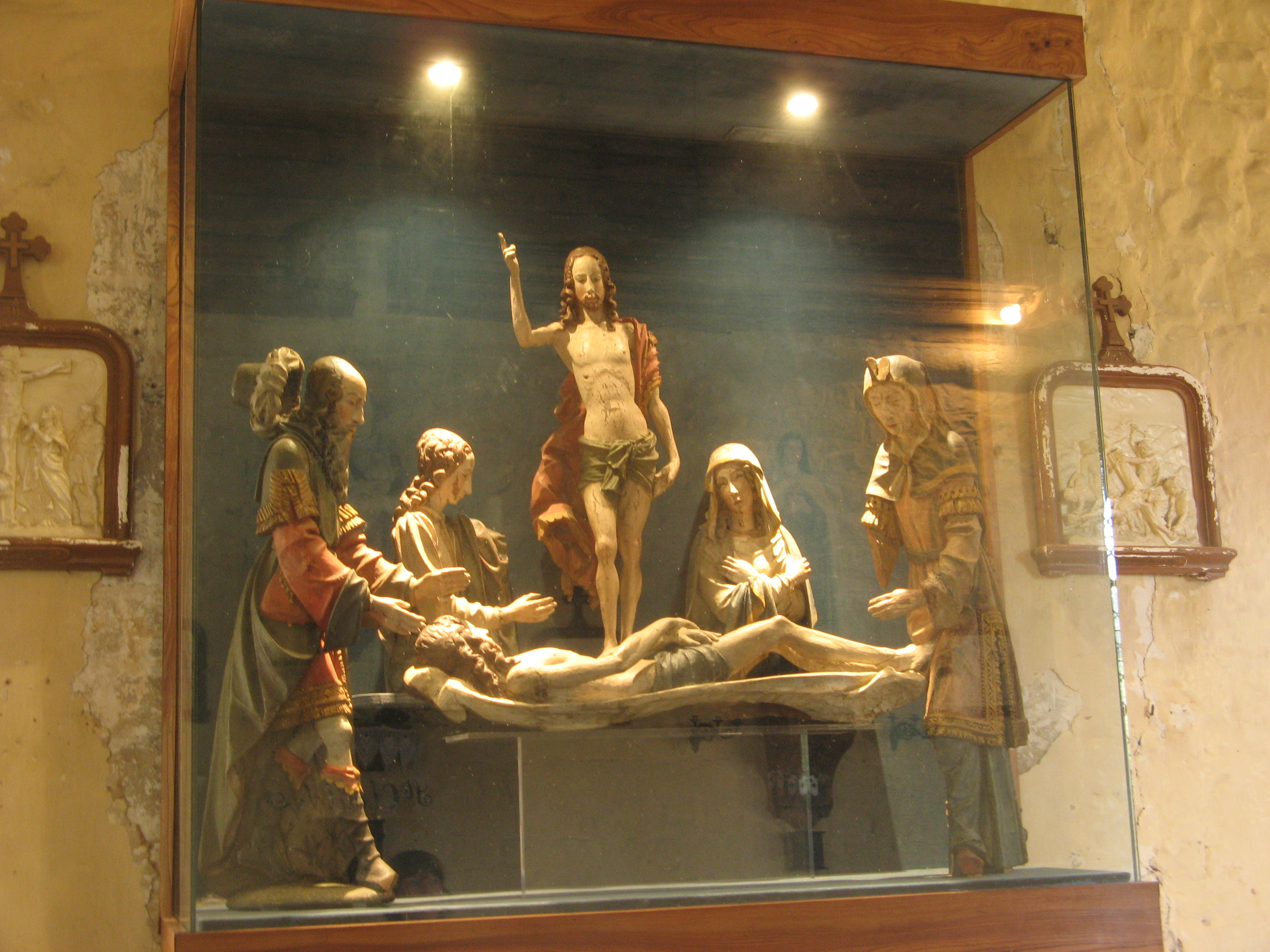 Sculpture en bois polychrome, provenance inconnue,commune d'Angiens , église d'Iclon. Toutes informations sera bienvenues